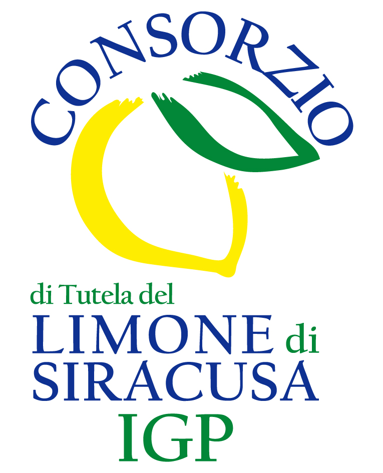 © Consorzio di Tutela del Limone di Siracusa IGP 2012